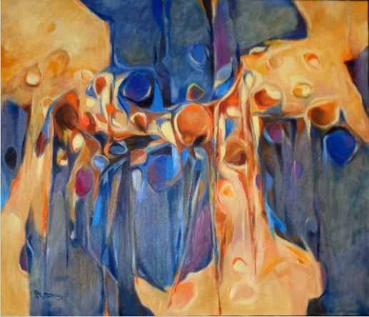 Werk von Pit von Frihling: Eine Legende, Öl auf Leinwand, 2006